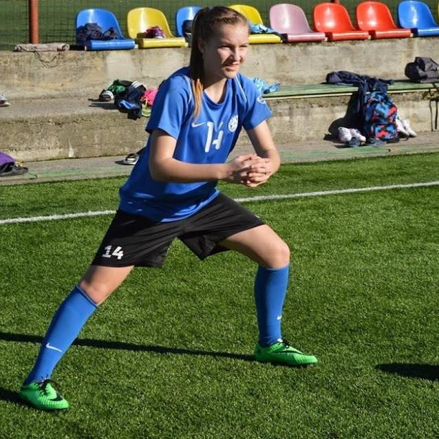 U17